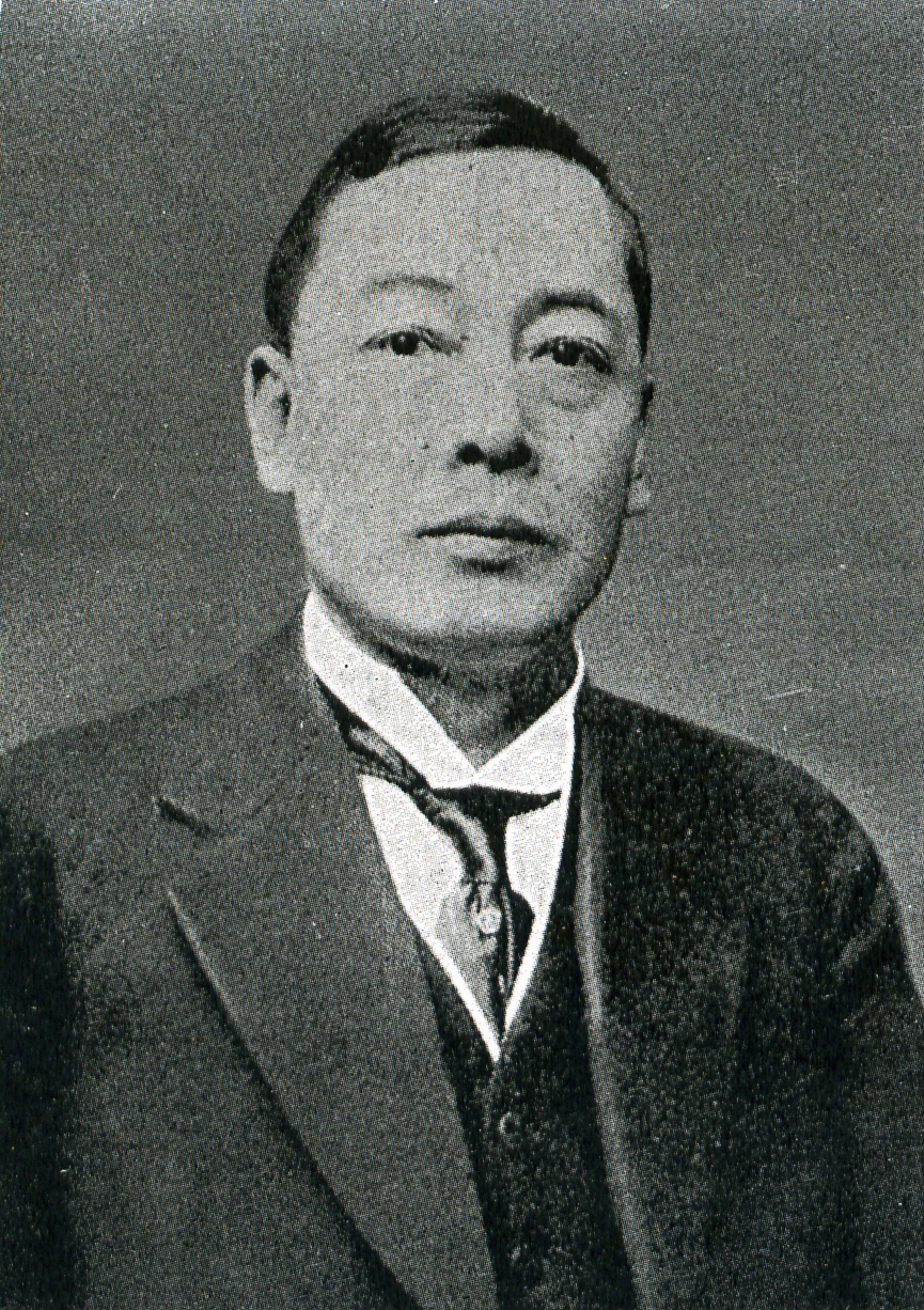 この写真は、砂田重政（1884-1957）の写真です。